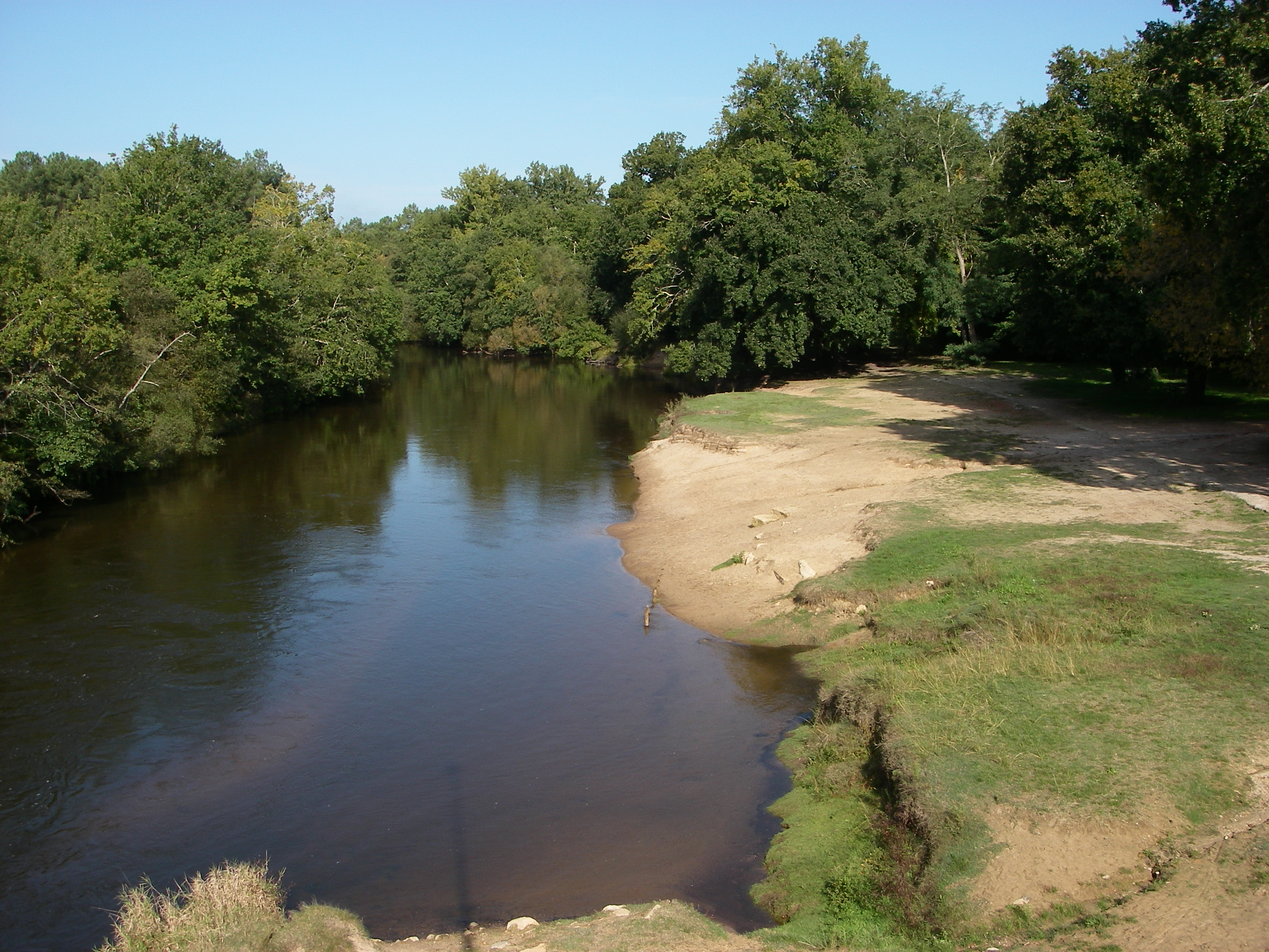 La Leyre au niveau de la Halte Nautique de Mios, octobre 2006 Licensing Catégorie: Pays de Buch